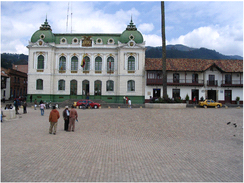 Aspecto del edificio de la alcaldía de Zipaquira al costado norte de la plaza principal.